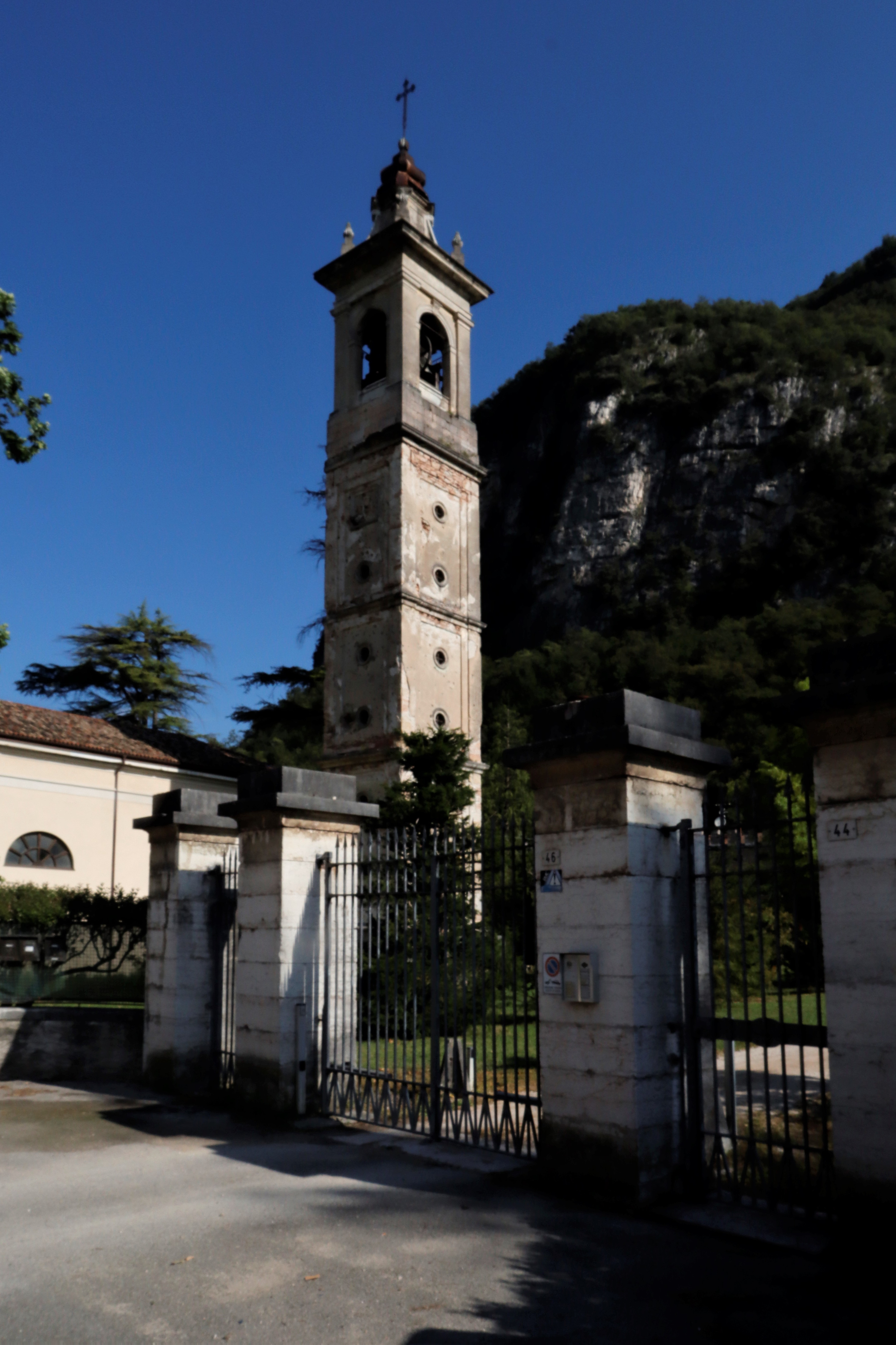 campanile della chiesa del Nome di Maria visto dal cancello della villa